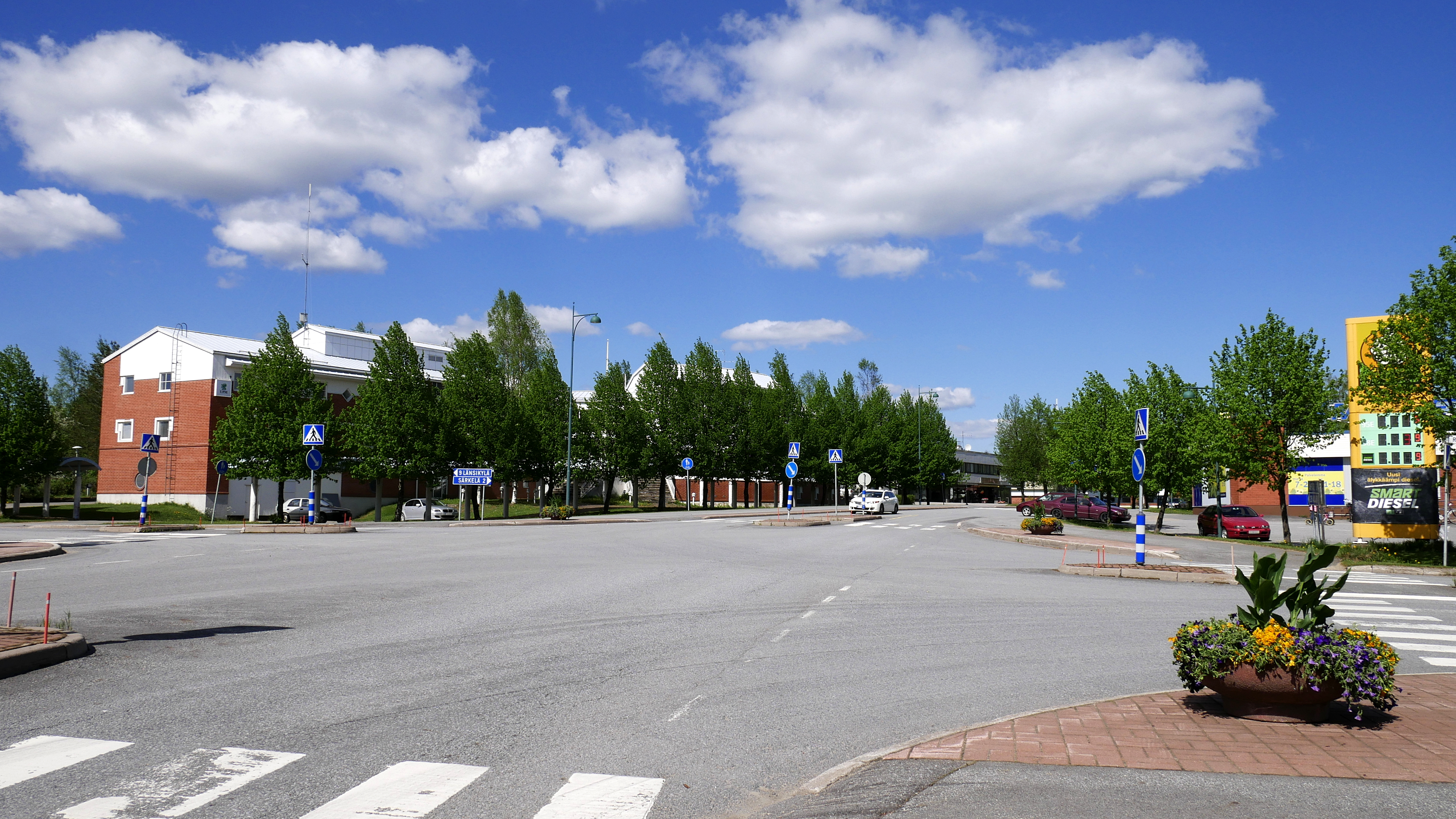 Kirkonkyläntietä (kantatie 68) Lehtimäellä.